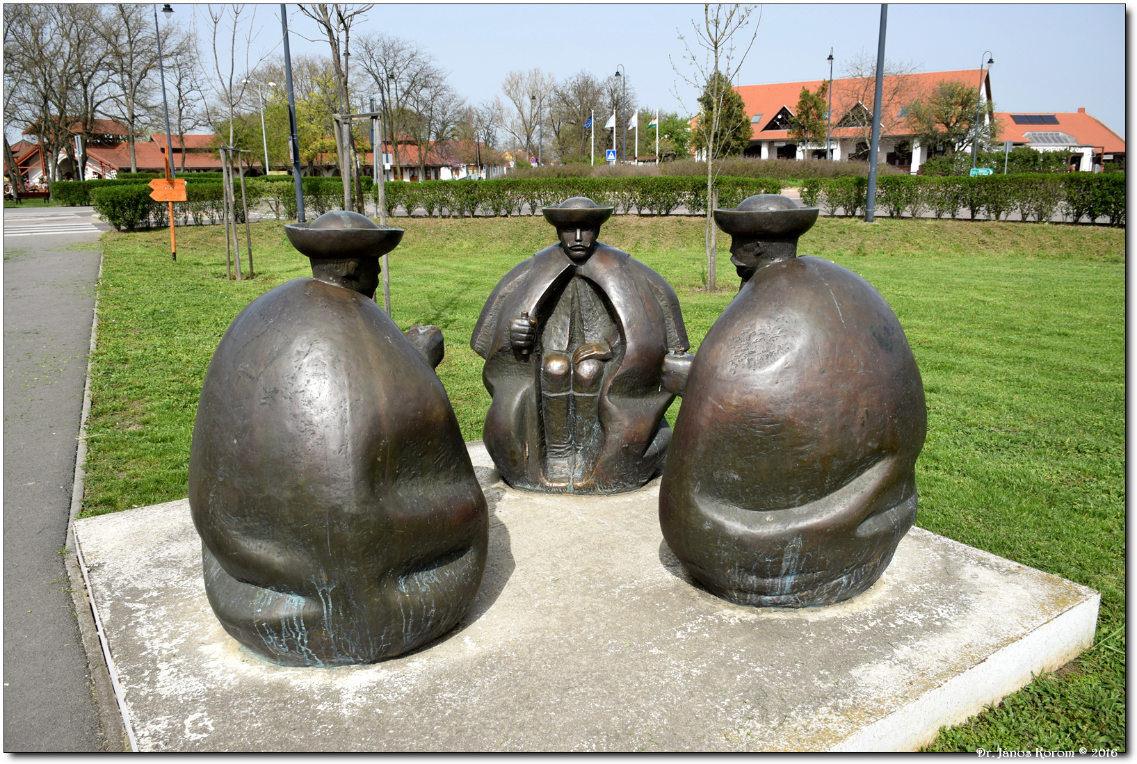 Somogyi Árpád: Juhászok szobra (1983), Magyarország, Hajdú-Bihar megye, Hortobágy